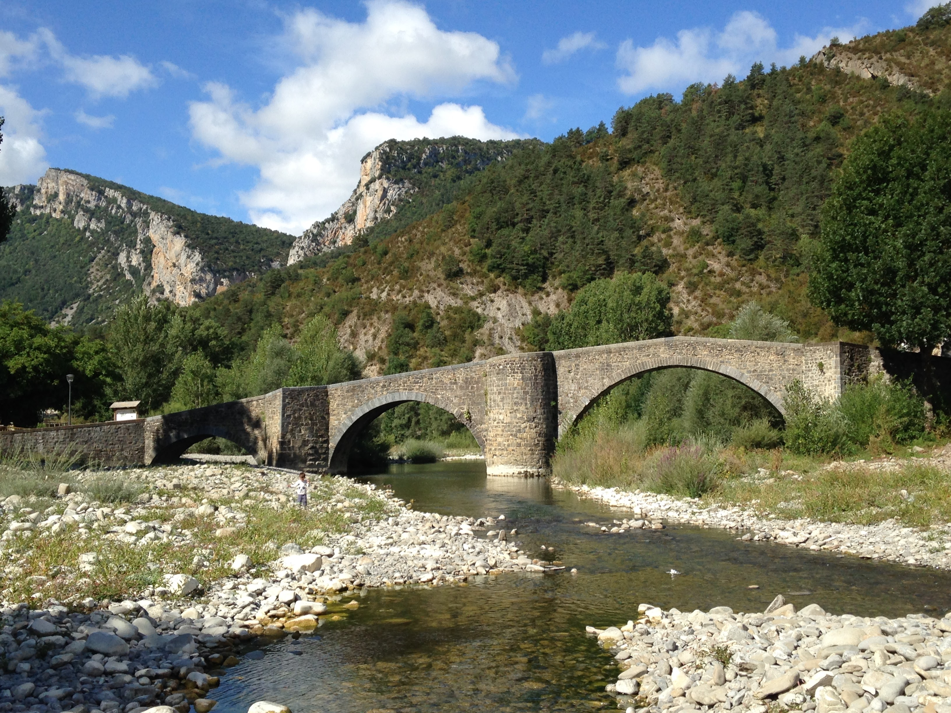 Burgiko zubia, iparraldetik ikusia